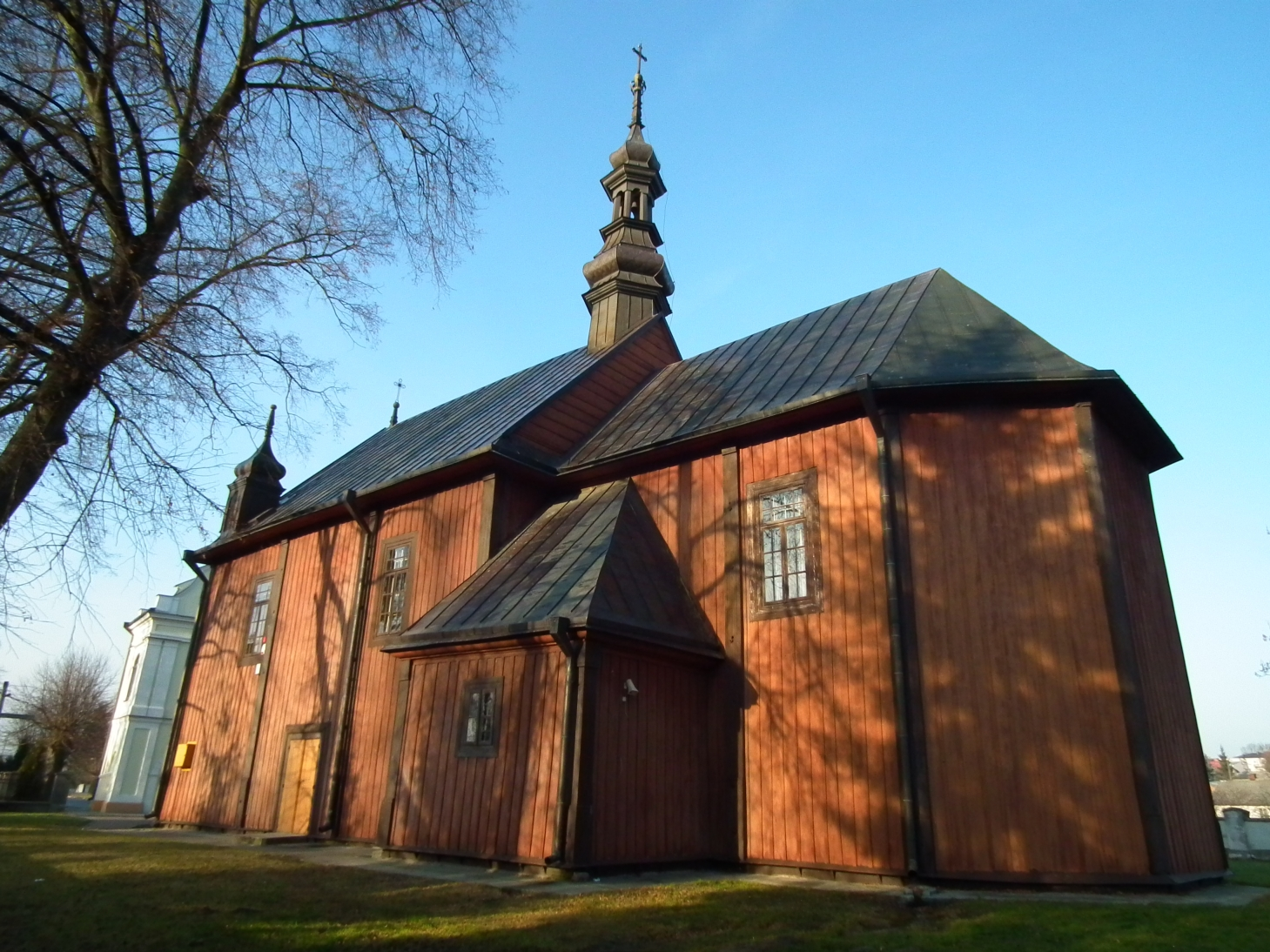 Kościół par. p.w. śś. Stanisława Biskupa i Marii Magdaleny (drewn., 1730-48)Dzwonnica (1880)Cmentarz przykościelny Dzierzkowice, Dzierzkowice